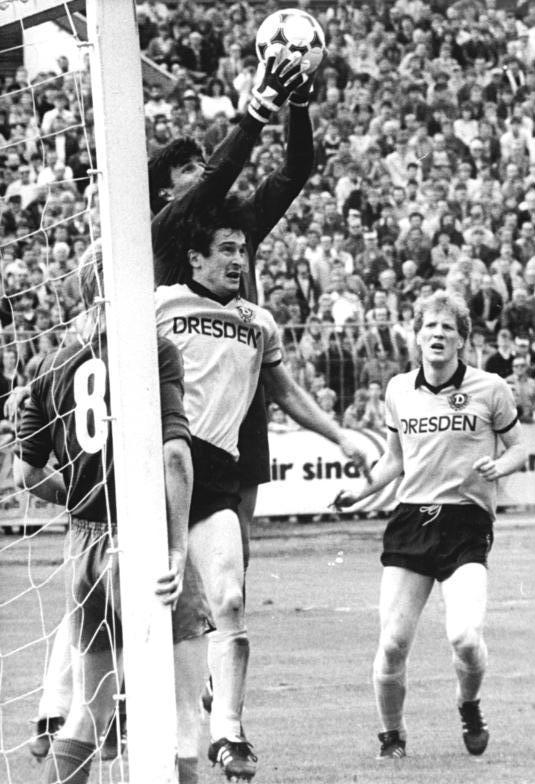 ADN-ZB-Häßler -23.5.87-A-Dresden: Fußball-Oberliga- Dynamo Dresden - 1. FC Lok Leipzig 2:0- Die Elbstädter sicherten mit dem Sieg gegen den Tabellendritten bereits am vorletzten Spieltag ihren Rang als Vizemeister. -Lok-Torwart Renè Müller rettet vor den Dresdnern Hans-Uwe Pilz - Schütze des 2:0 - und Mathias Sammer (r.).